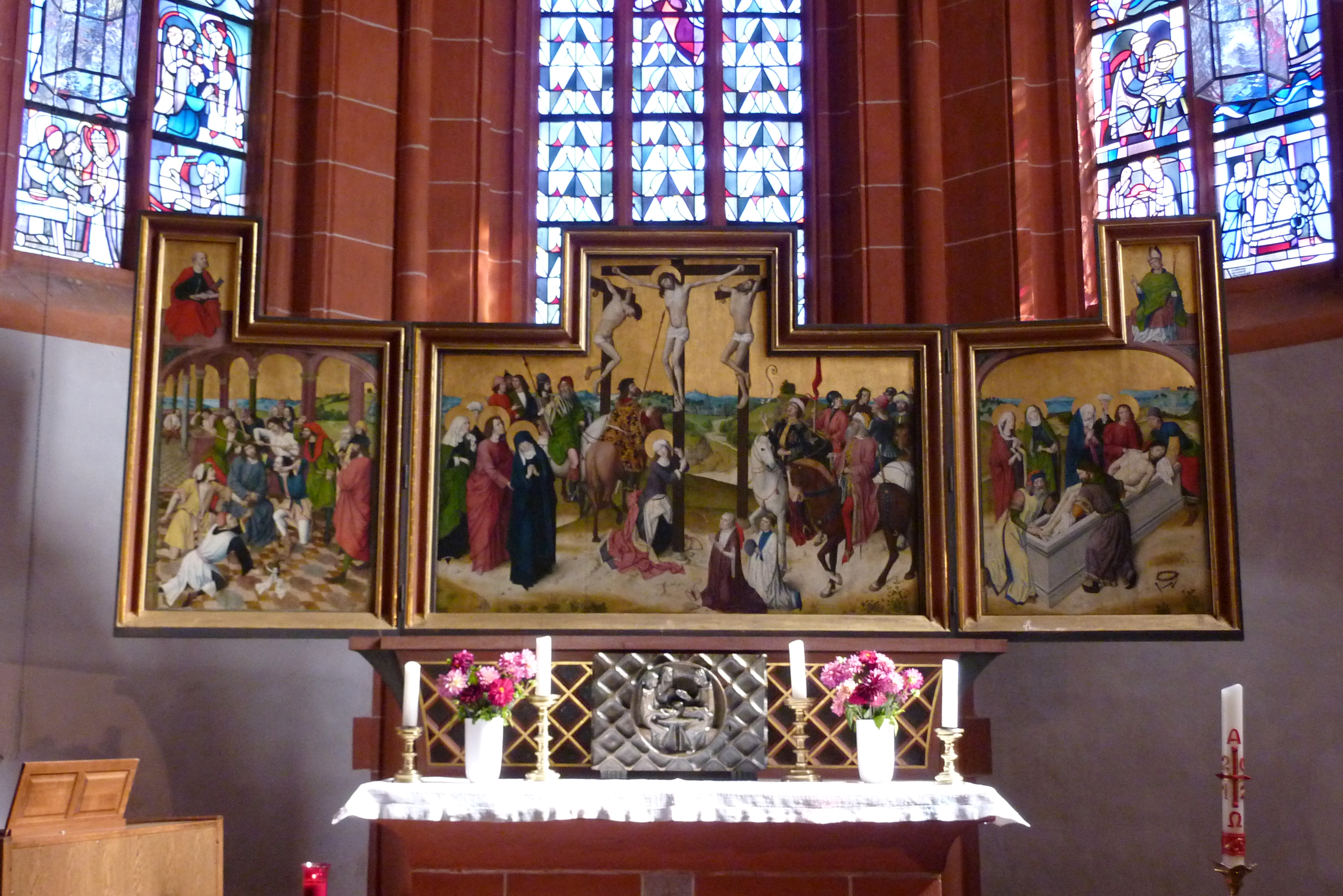 Stiftskapelle des St. Nikolaus-Hospitals (Cusanusstift) in Bernkastel-Kues im Landkreis Bernkastel-Wittlich (Rheinland-Pfalz), Passionstriptychon, dem Kölner Meister des Marienlebens (1460-1485 tätig) zugeschrieben